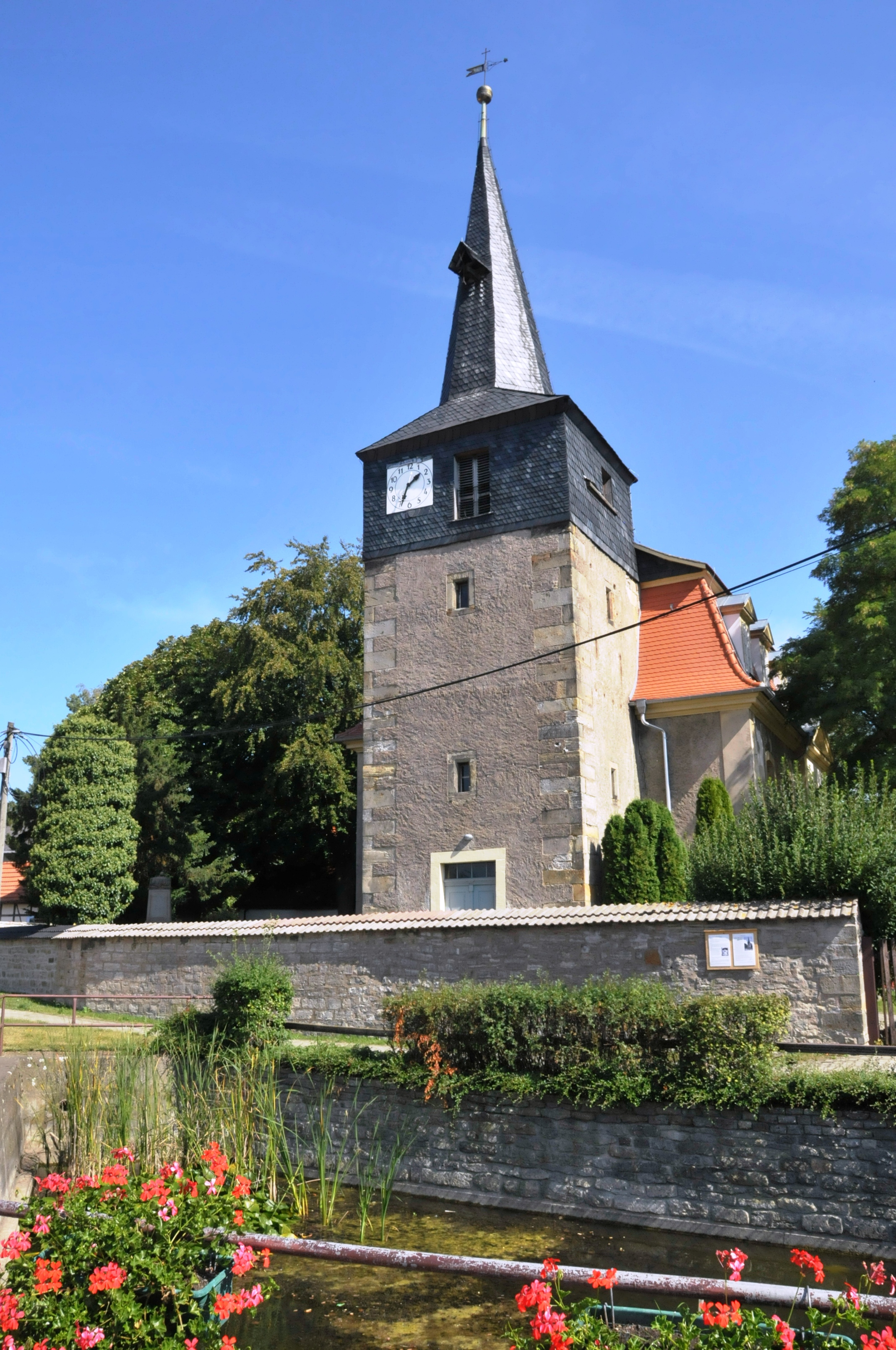 Bienstädt, Friedenskirche mit Schwemme